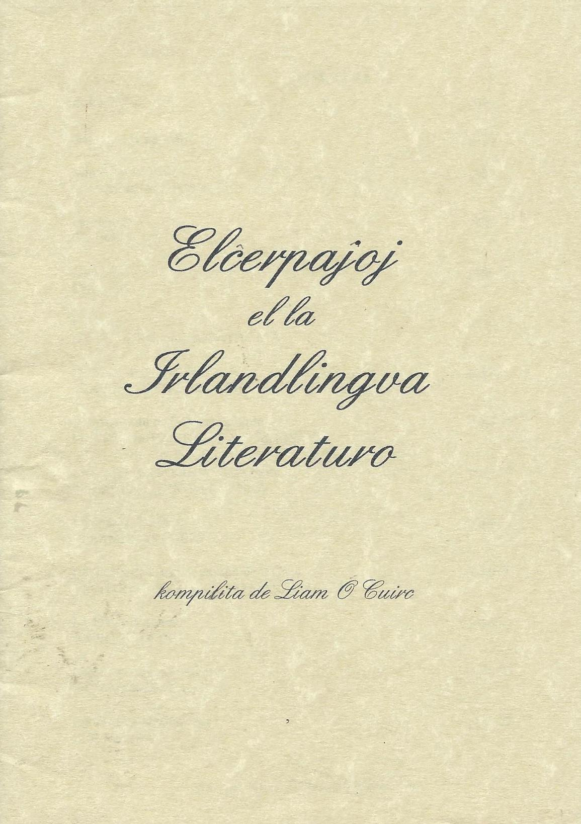 librokovrilo de libro "Elĉerpaĵoj el la Irlandlingva Literaturo", 1996